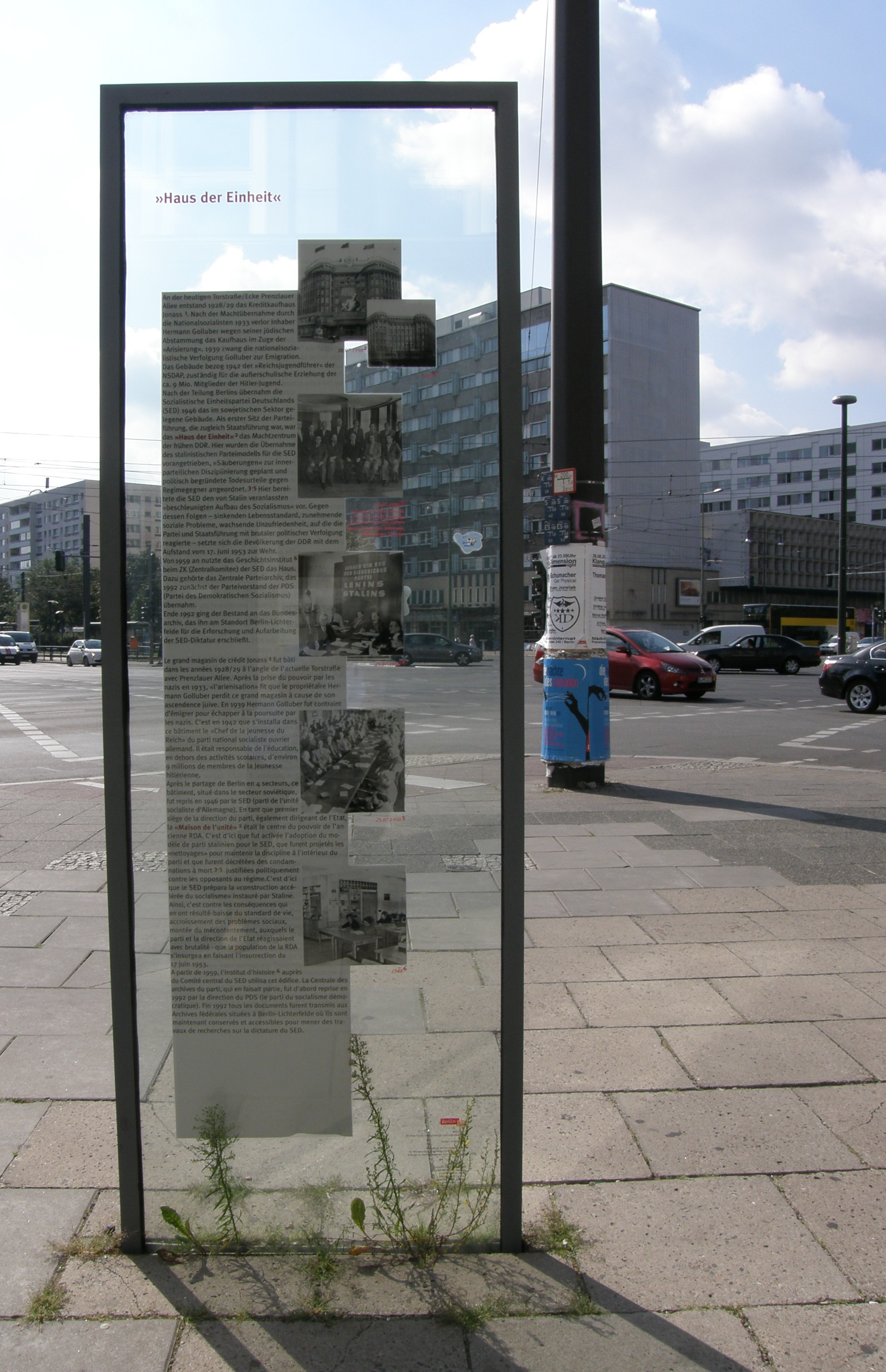 Prenzlauer Berg, eh. Kaufhaus Jonaß, Geschichtsstele vor dem heutigen Soho House Berlin